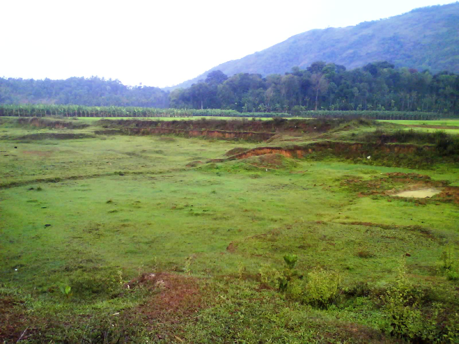 ഇഷ്ടിക കളത്തിനായി മണ്ണെടുത്ത കുഴികള്‍